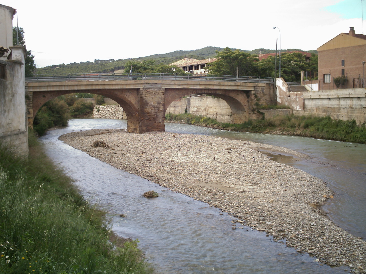 Rio Alhama en Fitero Navarra, España